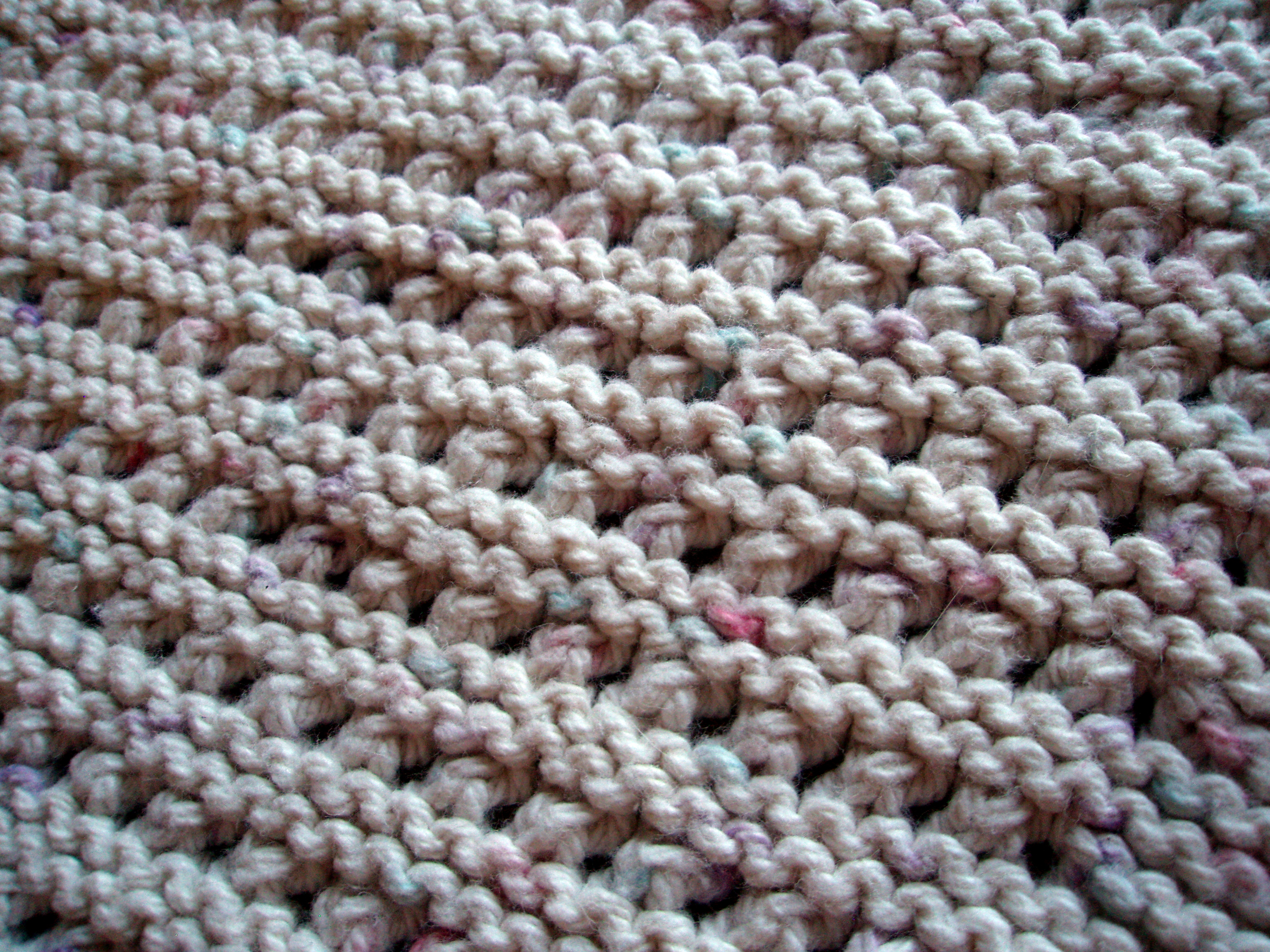 Eyelet Lace